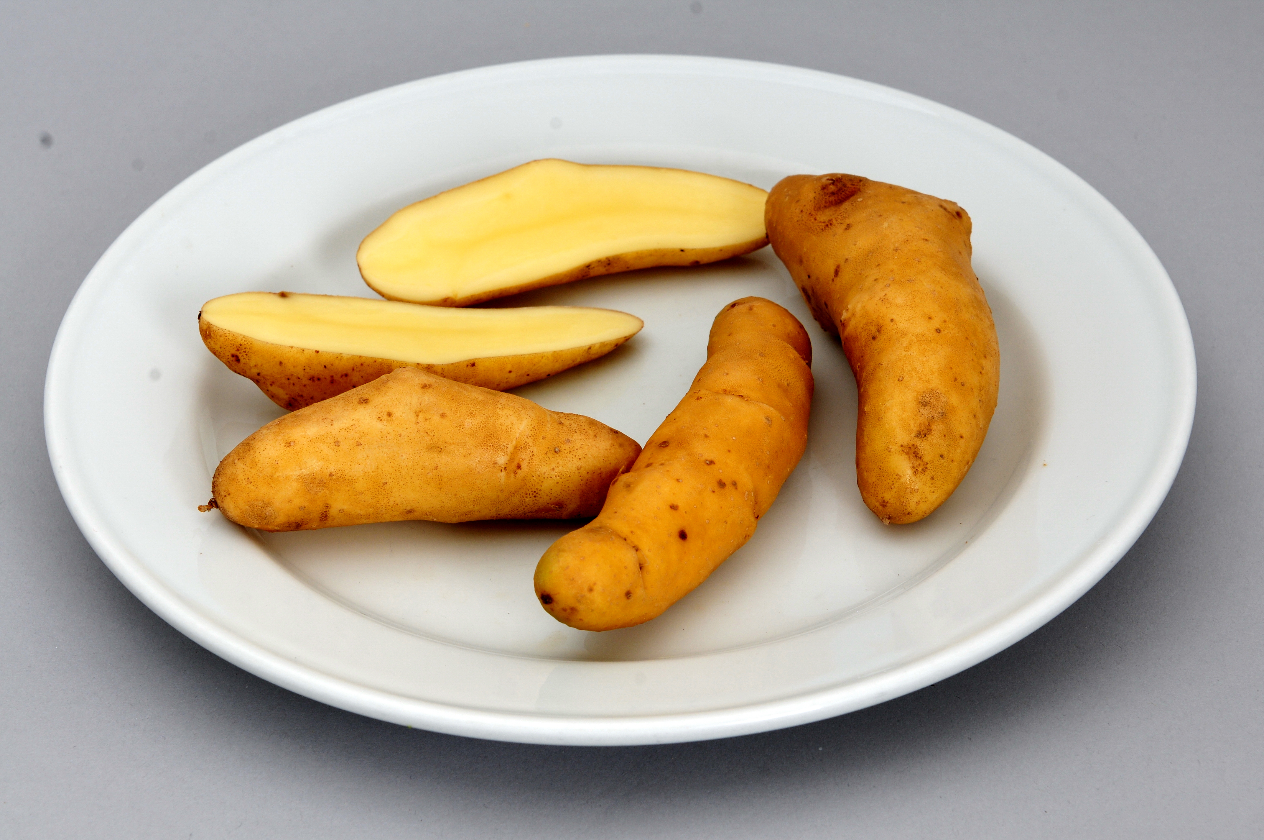 Treffen der Redaktion Essen und Trinken in Wien, Kartoffel der Sorte La Ratte